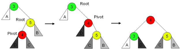 Imagem demonstrando como funciona uma rotação dupla à esquerda em uma árvore AVL.